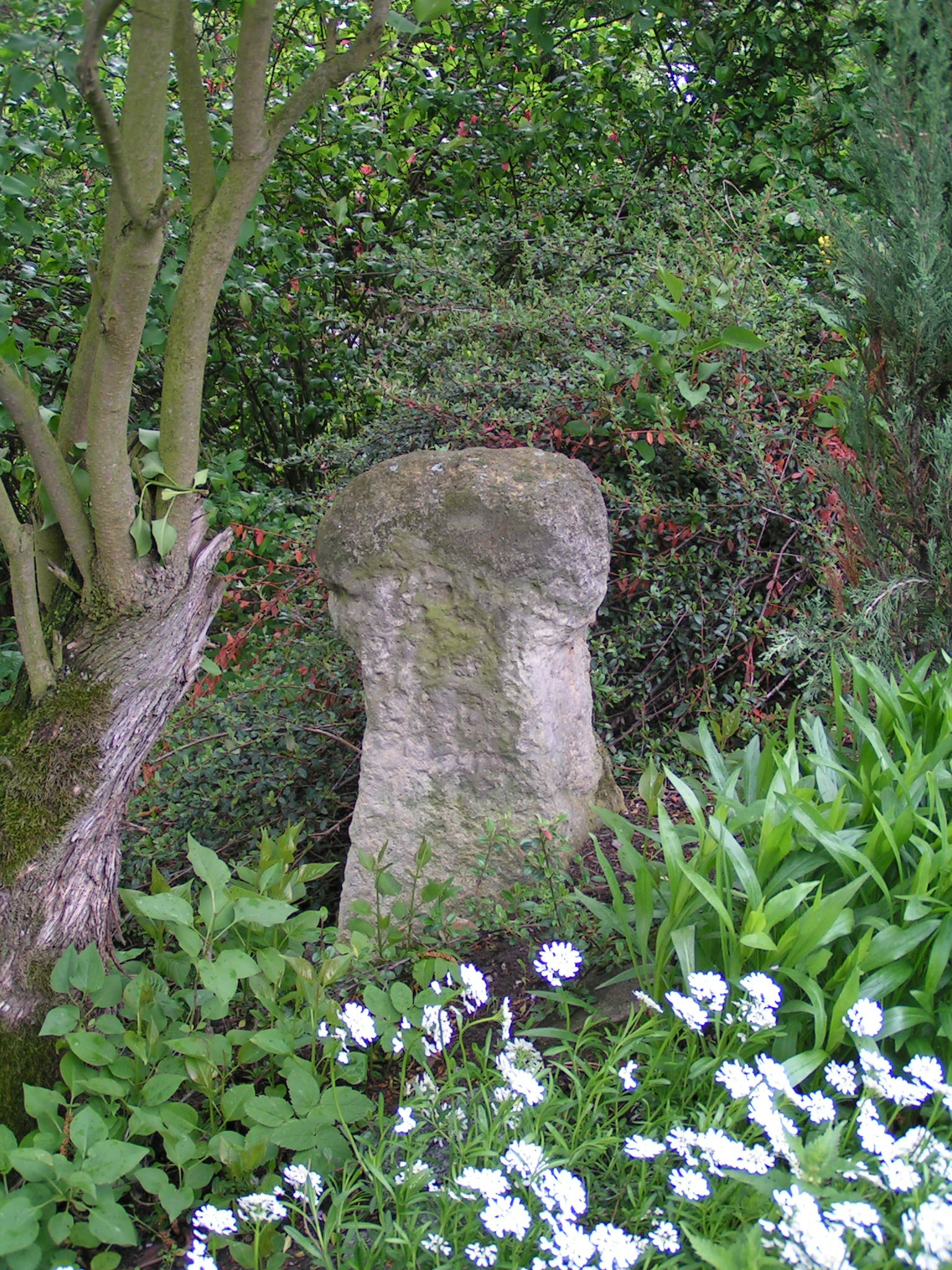 Smírčí kámen